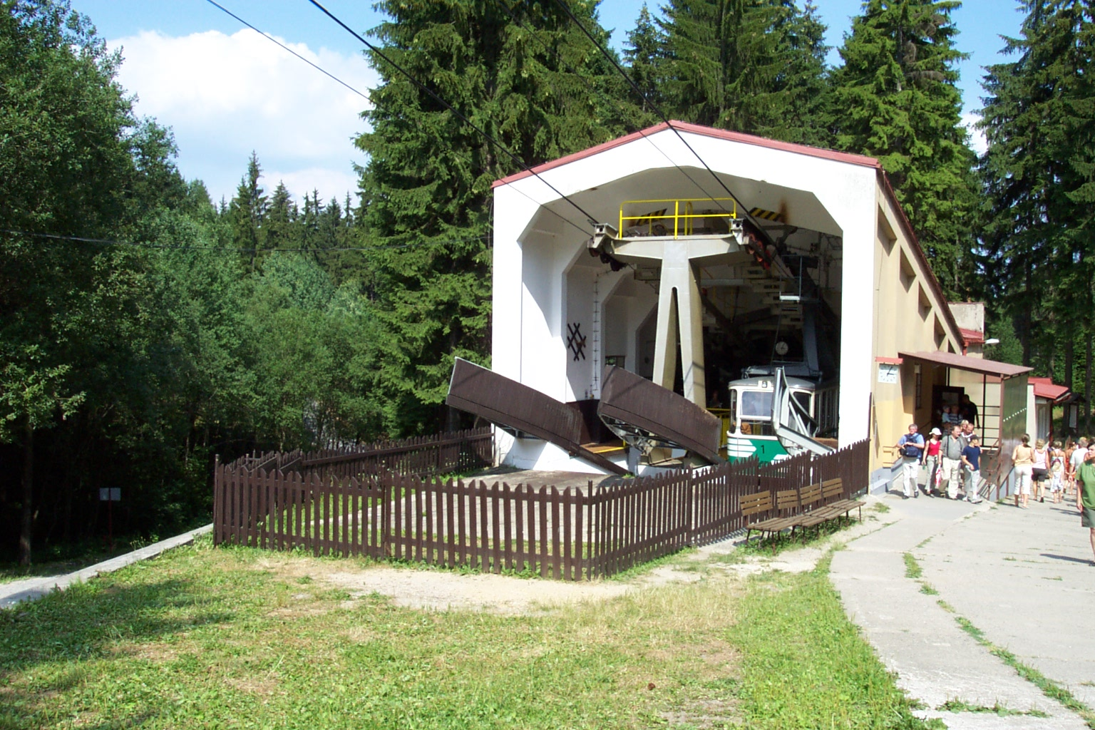 Lower cable car station, Ještěd, CZ - Ještěd, dolní stanice lanové dráhy